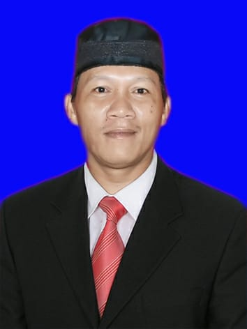 kades